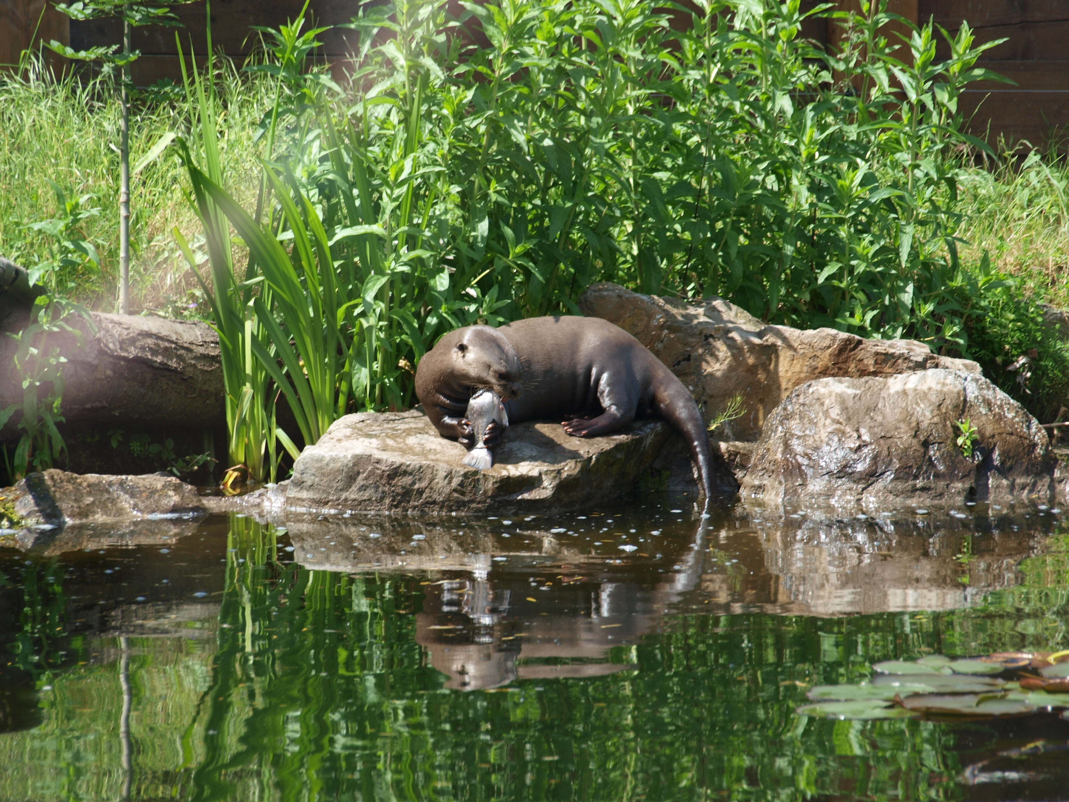 Une Loutre géante mangeant un poisson au zoo de Chester